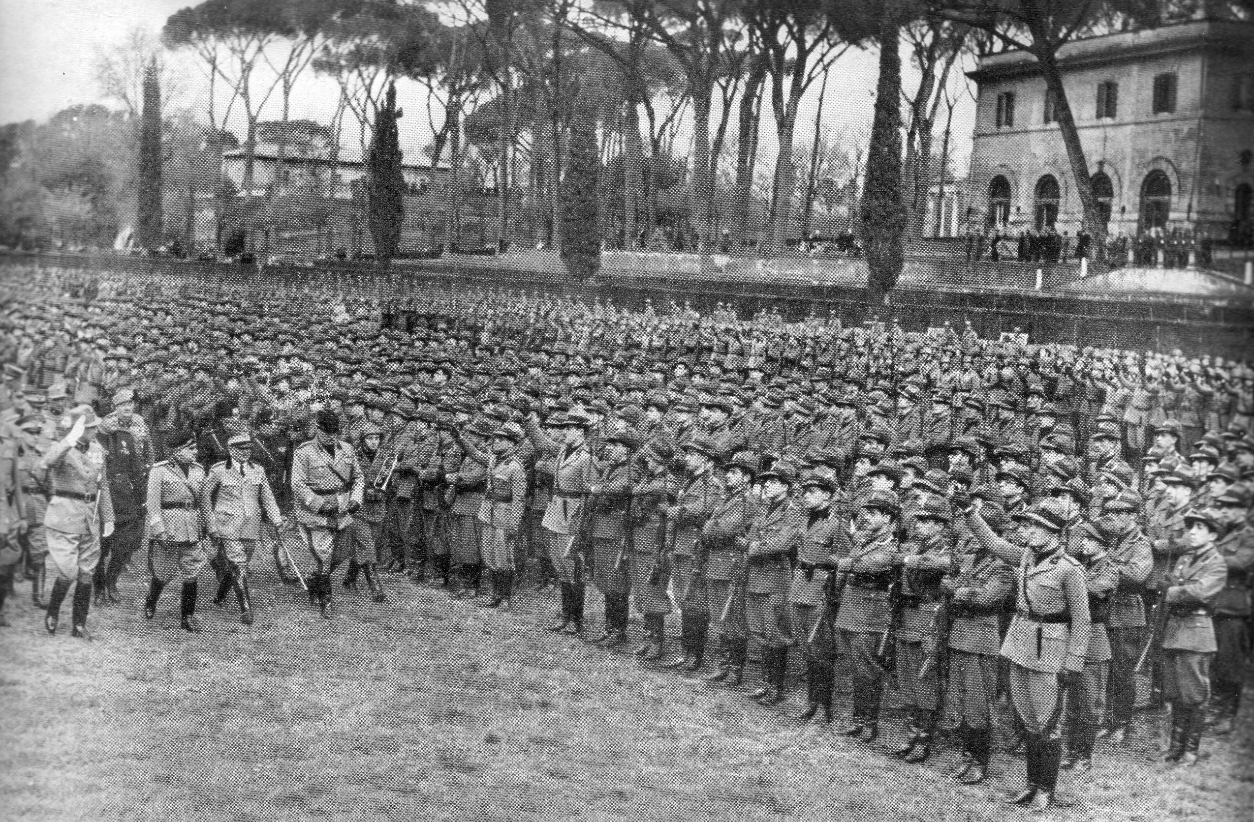 MVSN di Roma guidata da Luigi Russo e Felice Baistrocchi